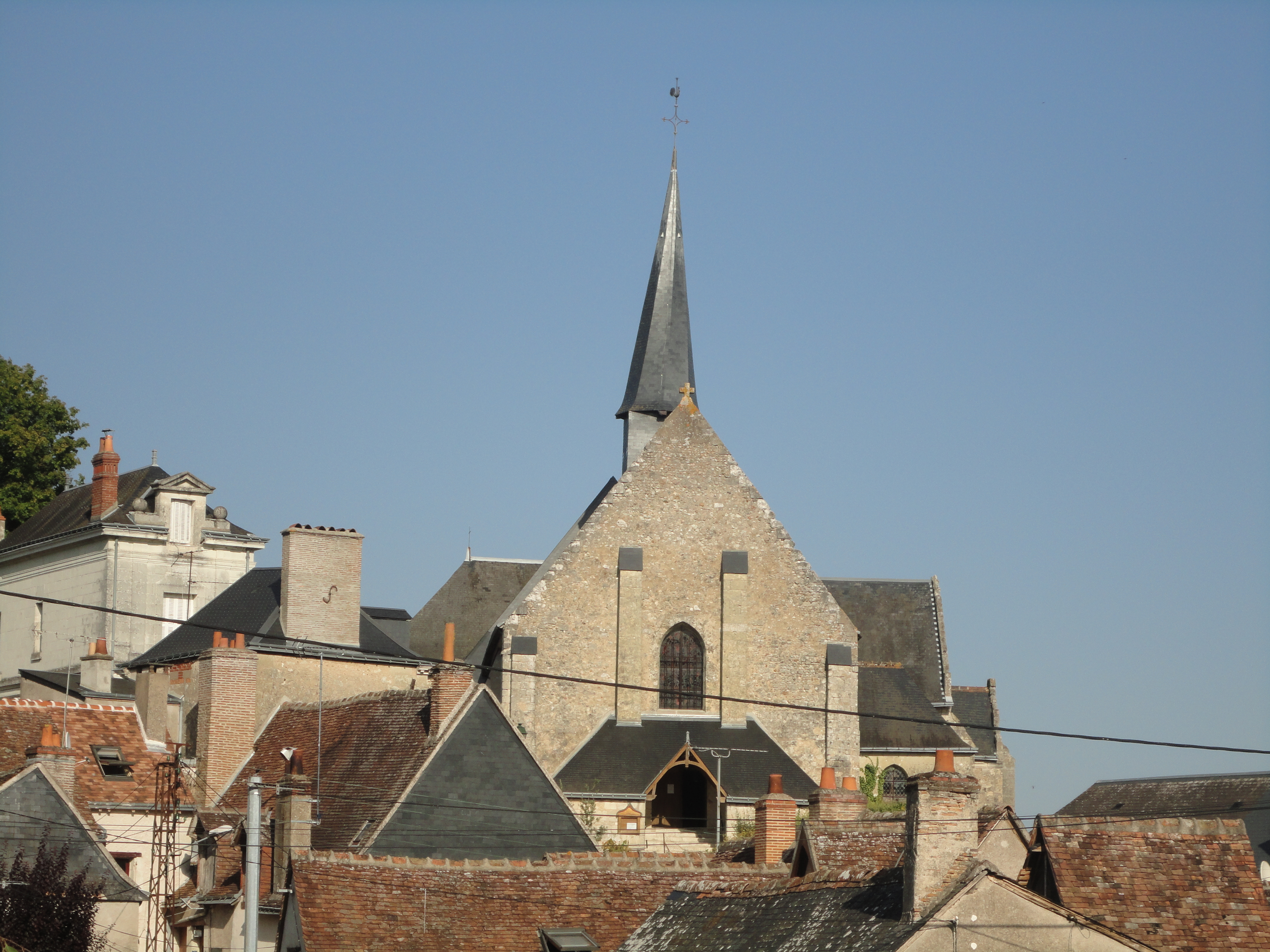 L'église de Reugny